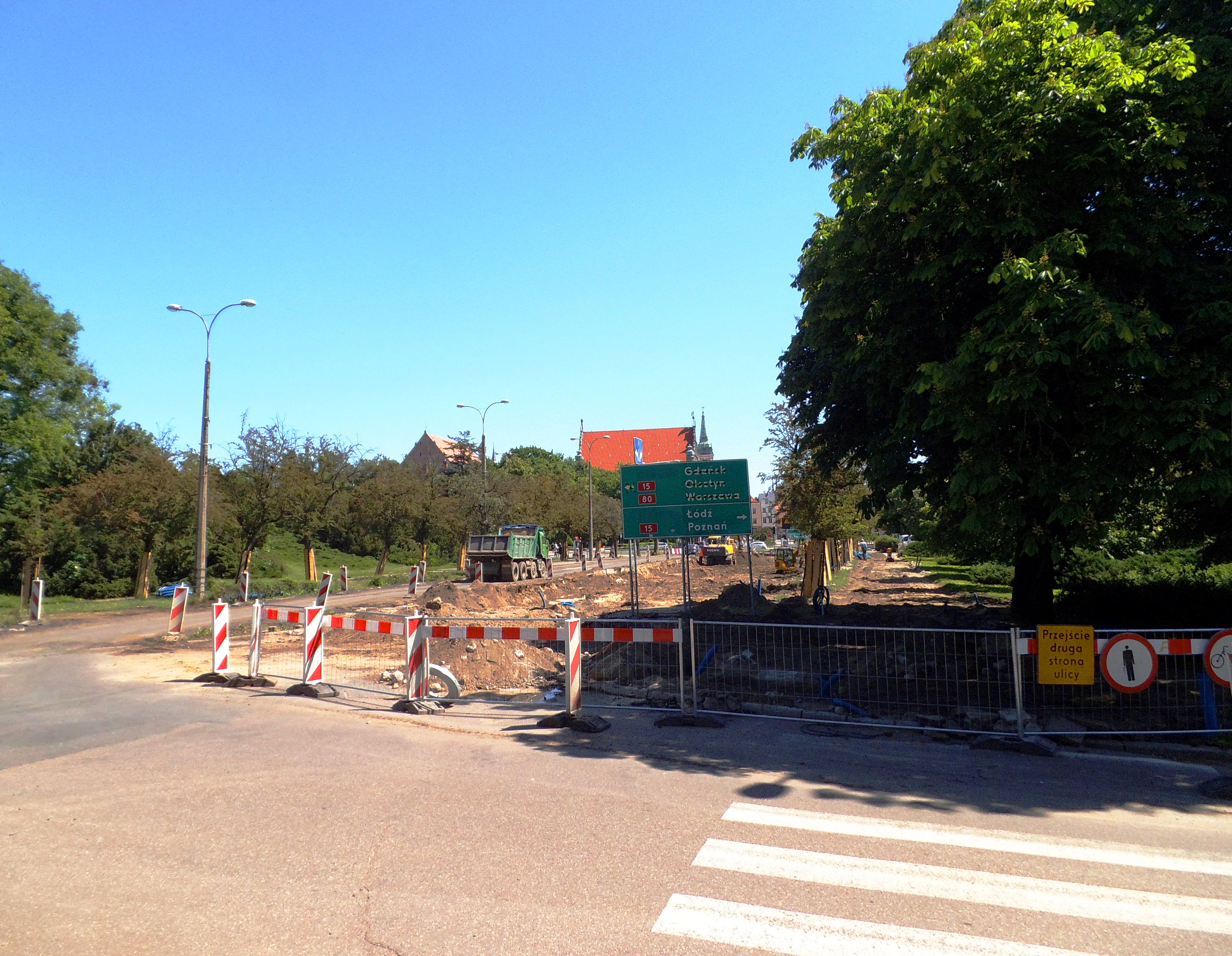 Ul. Chopina w Toruniu2019